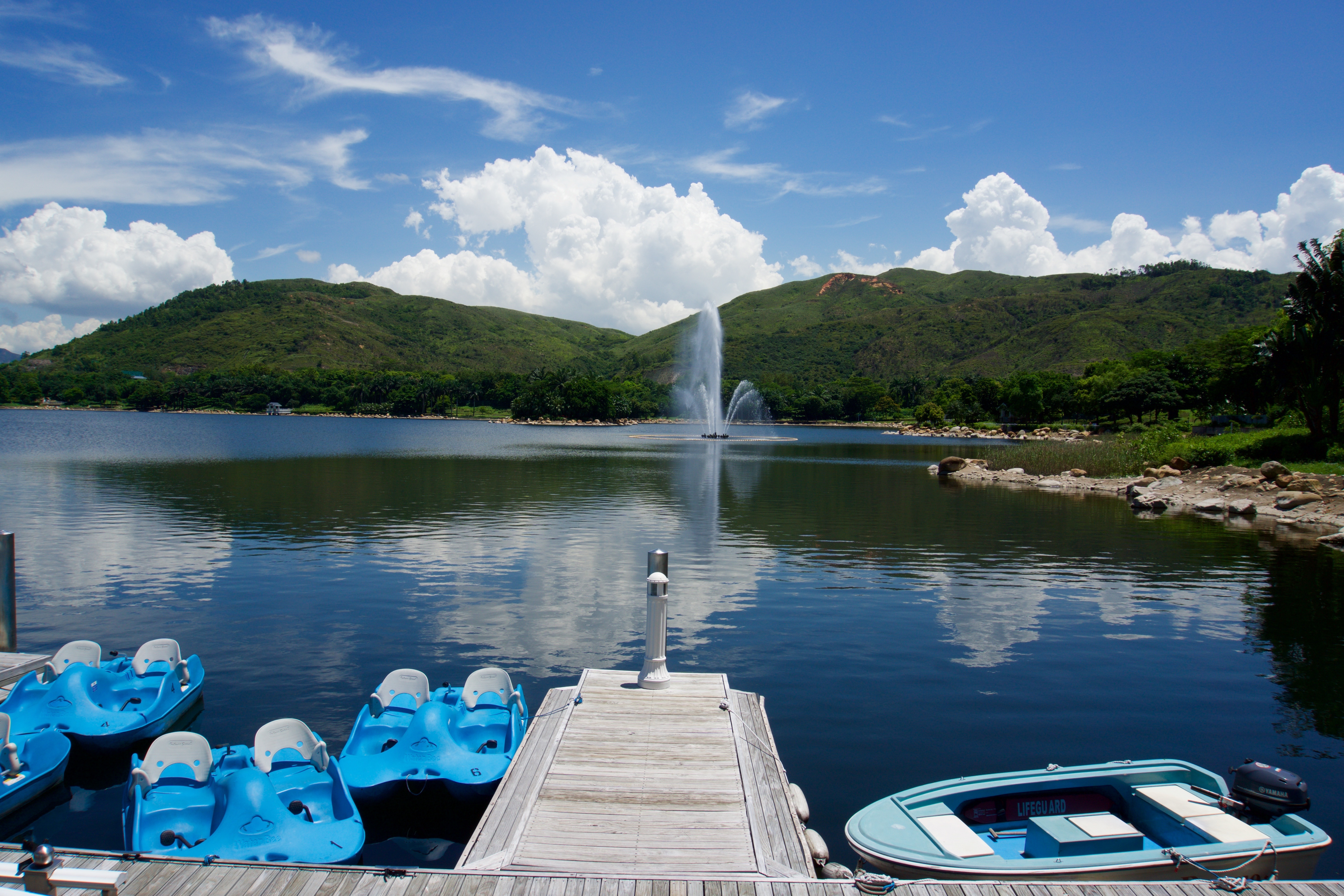 昨日去迪欣湖，天清氣朗，藍天白雲，拍攝最佳。不過天氣好熱，差點頂可順。